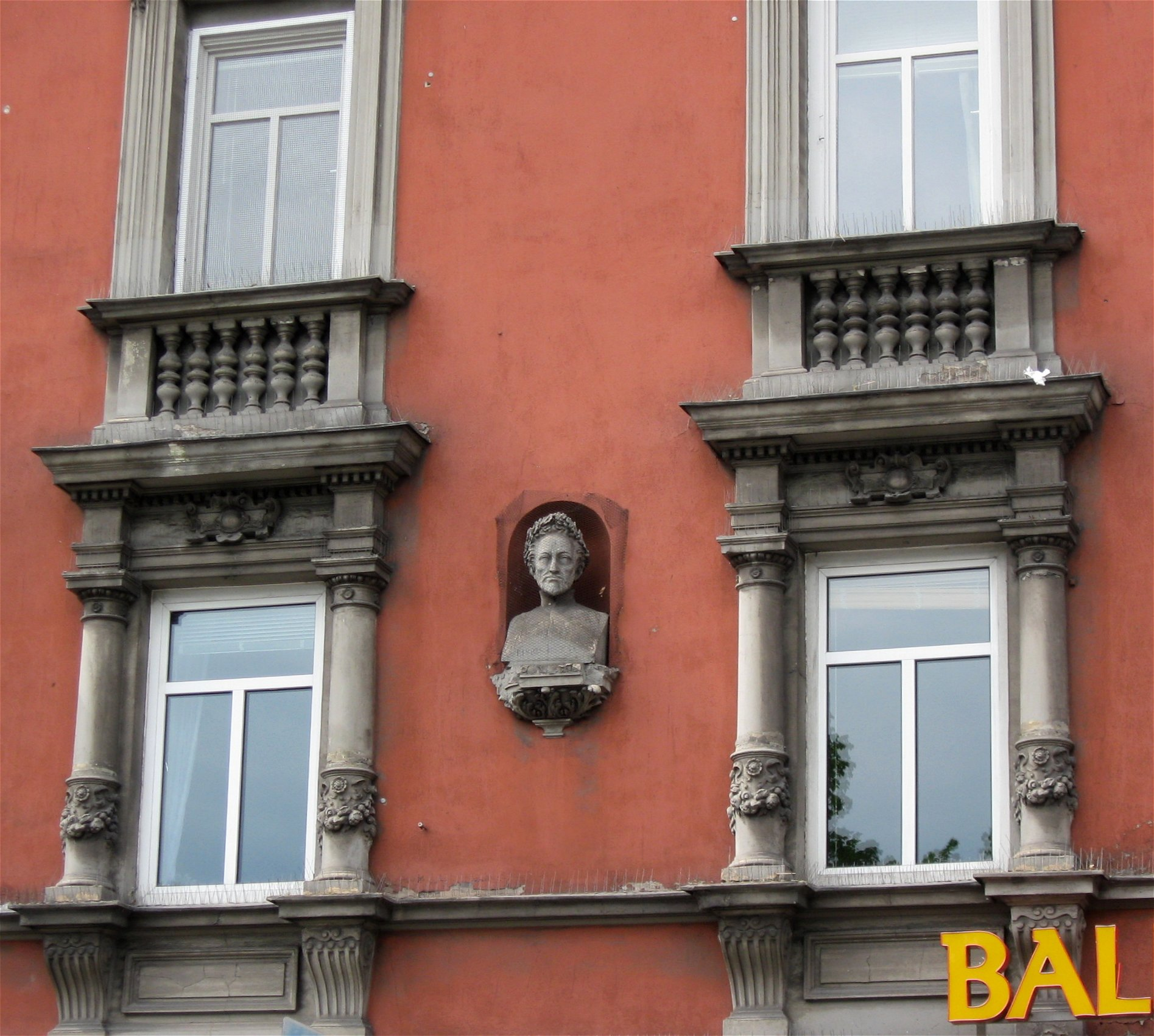 Auenstraße 84; Mietshaus in Ecklage am Baldeplatz, sehr reich gegliedert und dekoriert, 1889 von Michael Mayer; mit Büste des Dichters Jakob Balde.